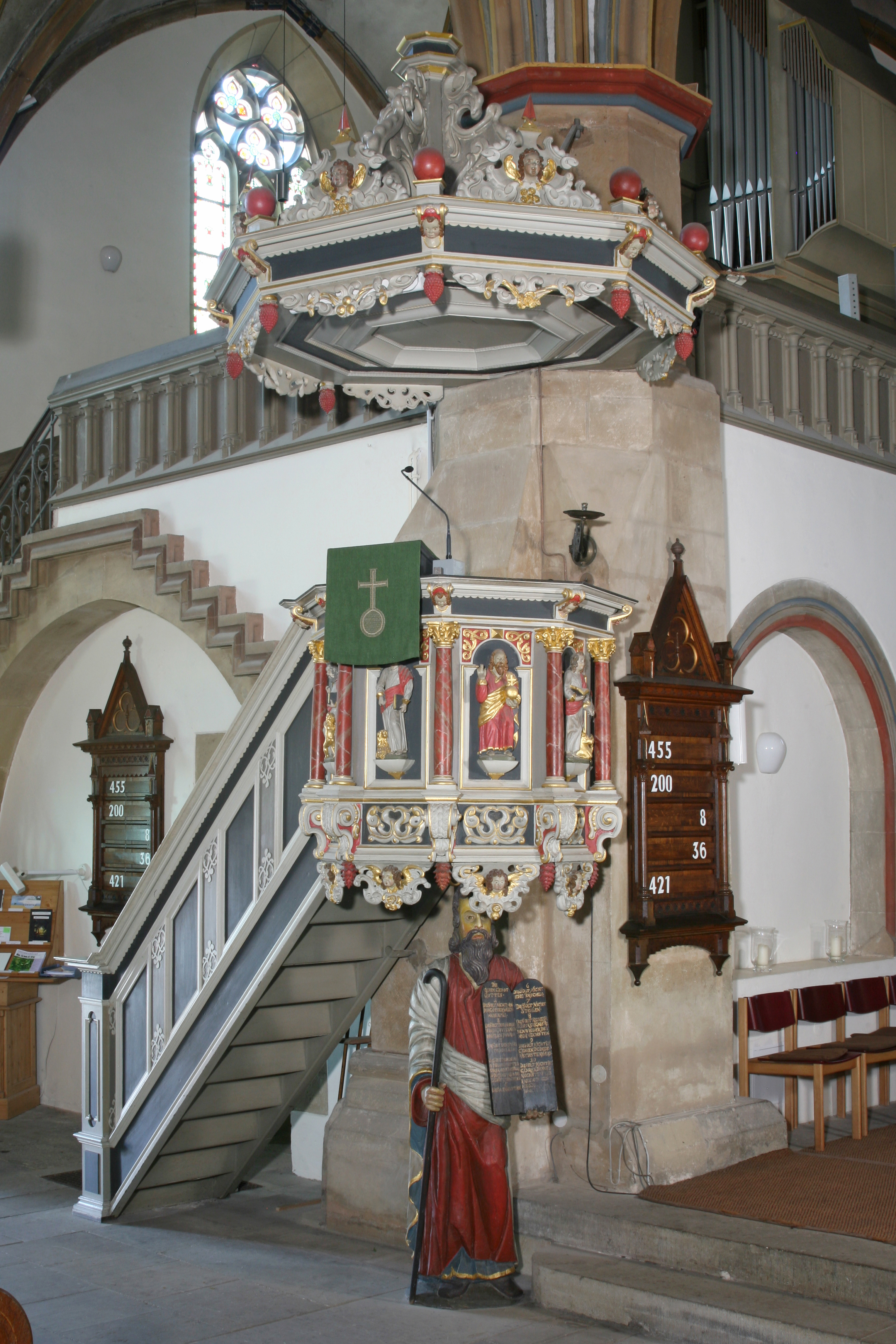 Kanzel in der Stiftskirche Obernkirchen